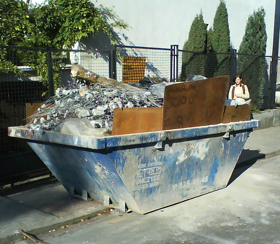 Skip